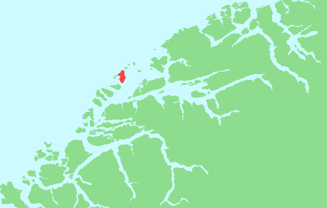 Locator map of Harøya, Møre og Romsdal, Norway